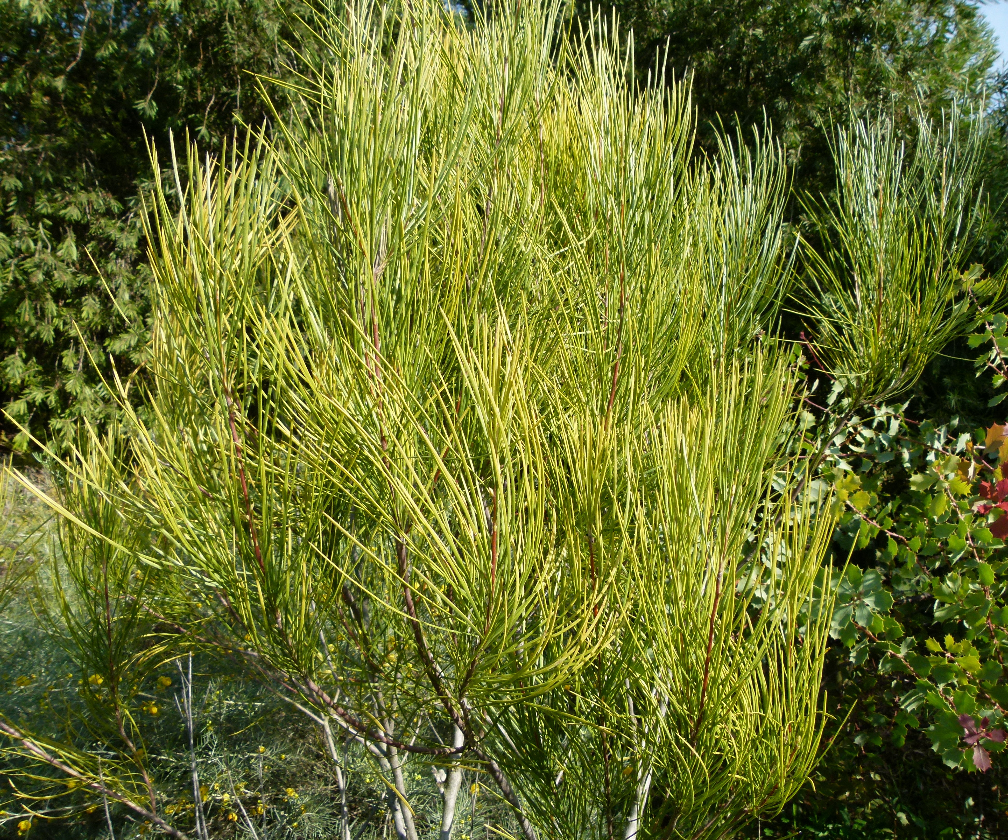 Jardin botanique de Barcelone